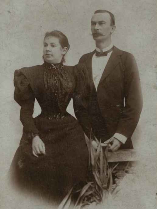 Udvardi és básthi Udvardy Vince (1854–1922) Zalaegerszeg városi képviselő-testületnek a tagja, a zalaegerszegi állami főgimnáziumi tanára, a "Zalamegyei Gazdasági Egyesület" pénztárnoka, Zala vármegye törvényhatósági és megyebizottsági tag, és felesége strauszenberghi Strausz Borbála (1861-1952)